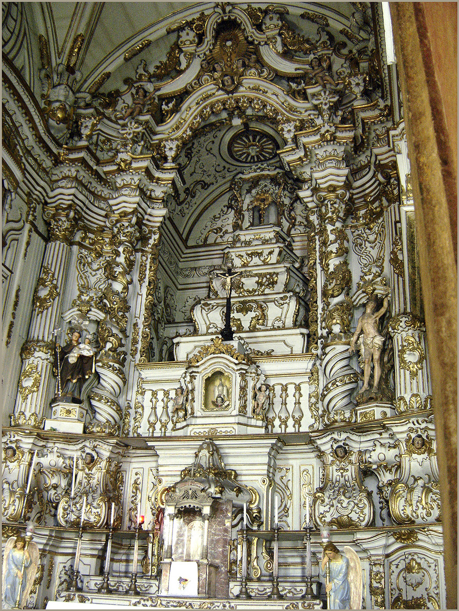 Altar-mor da Matriz de Santo Antônio, Recife, Pernambuco, Brasil.